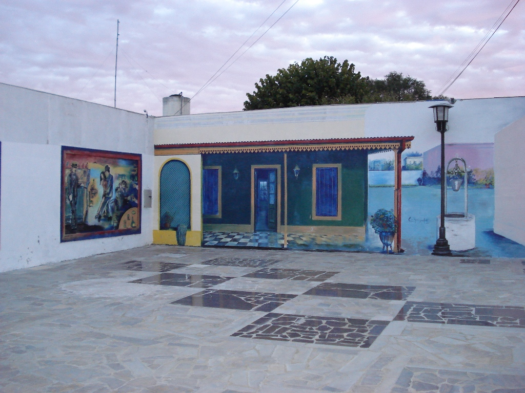 Pasaje peatonal ubicado en la Ciudad de Olavarría en la Provincia de Buenos Aires, Argentina.